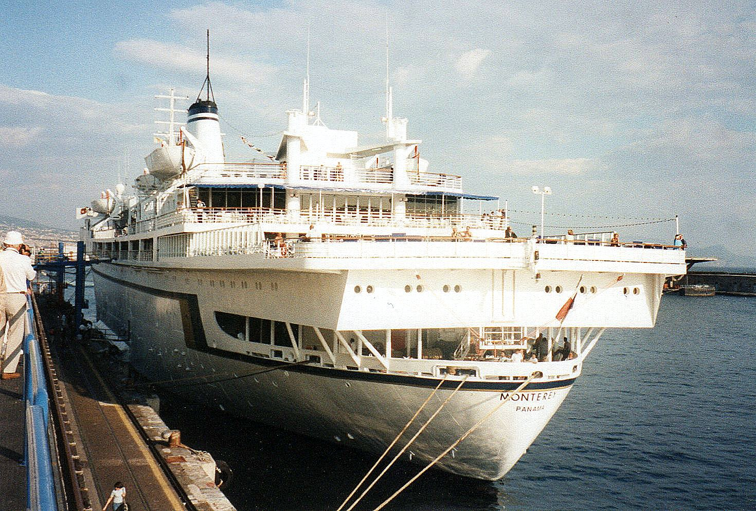 MSC Monterey in Neapel